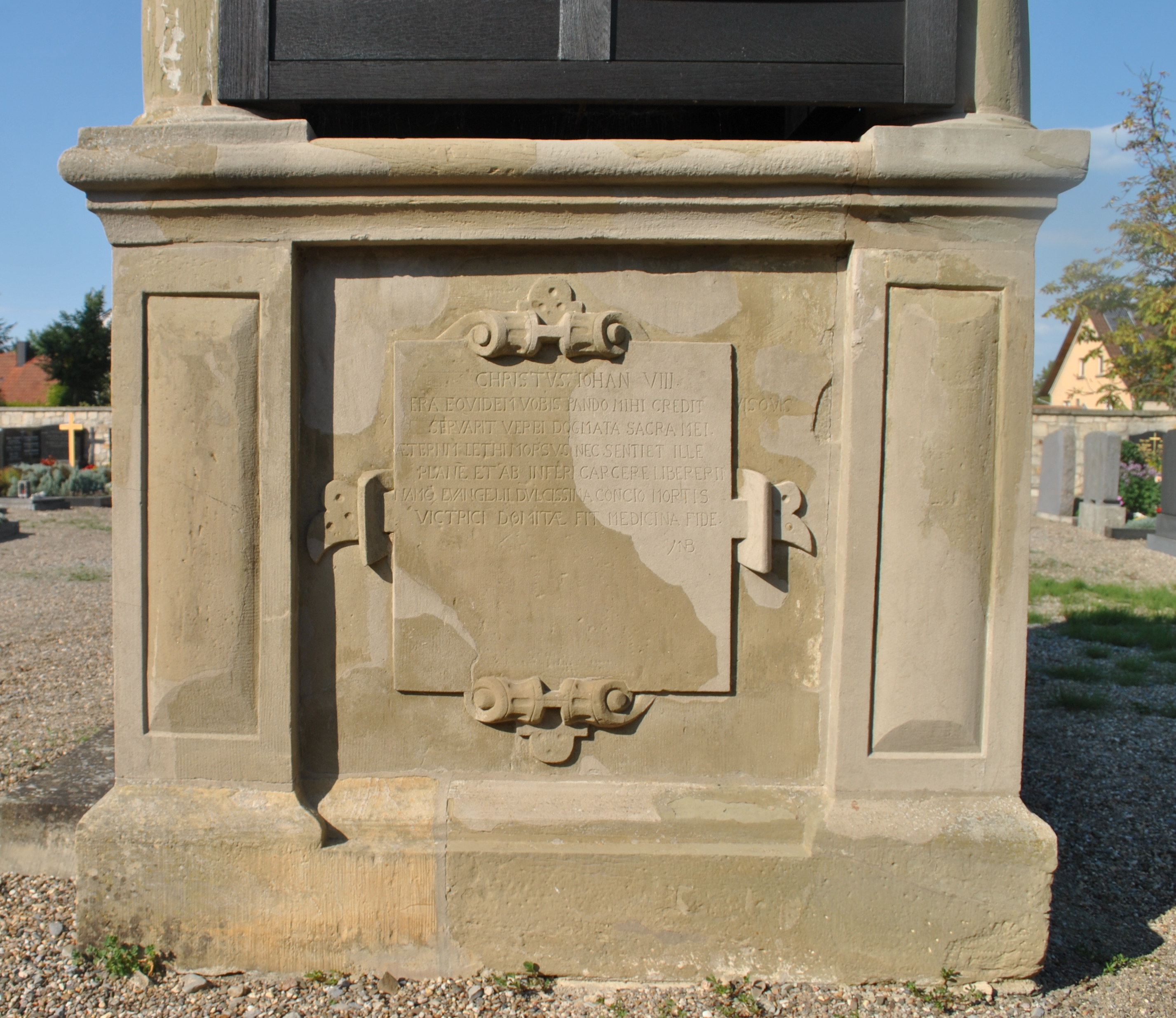 Friedhof angelegt 1542, erweitert 1588, Predigtkanzel 1659This is a photograph of an architectural monument.